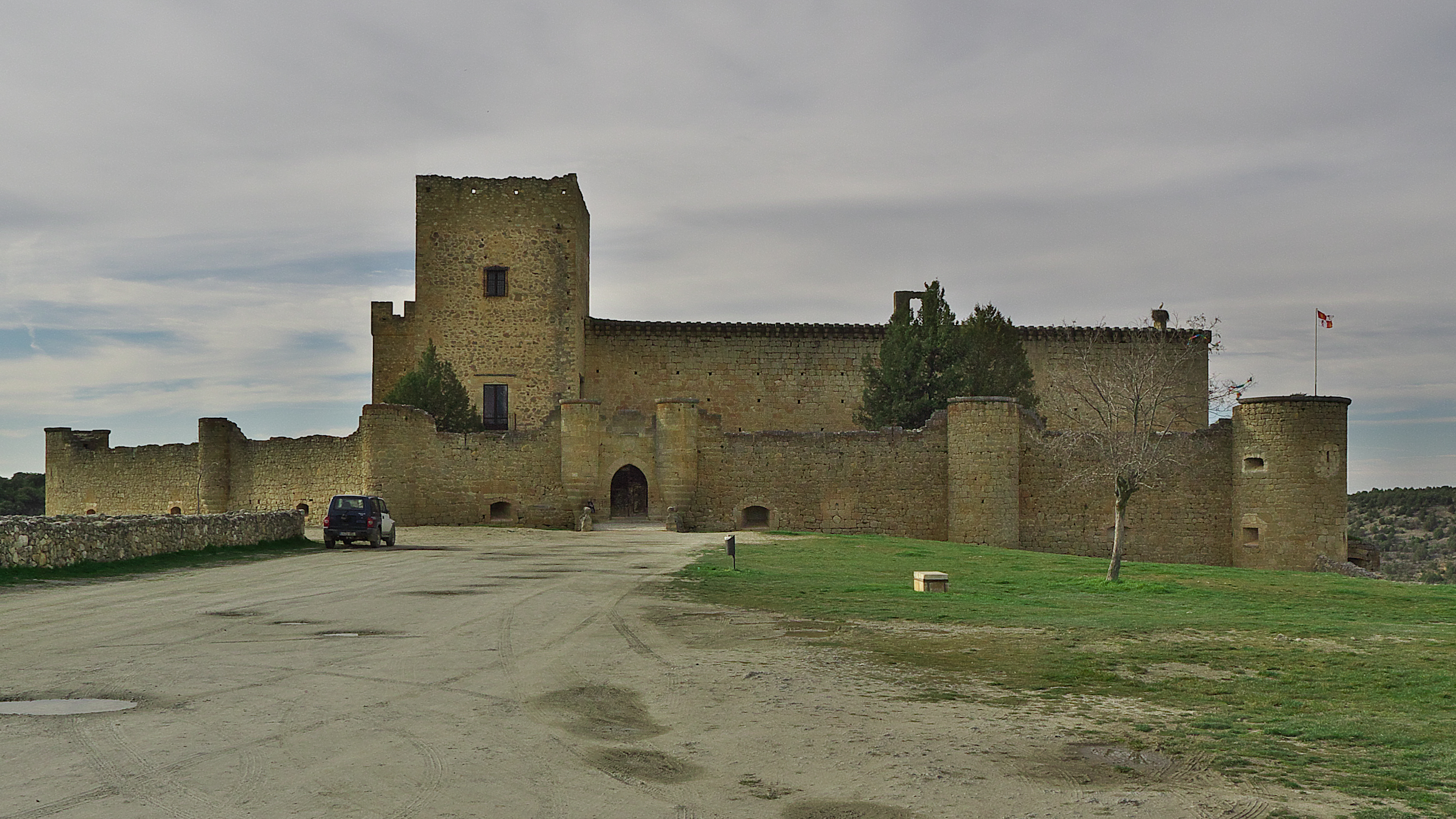 Blanca de Herrera y Niño de Portugal, V Señora de Pedraza, heredera del Castillo de Pedraza, se casa con Bernardino Fernández de Velasco y Mendoza, VII Condestable de Castilla y I Duque de Frías, que reformará el citado castillo (s. XVI)